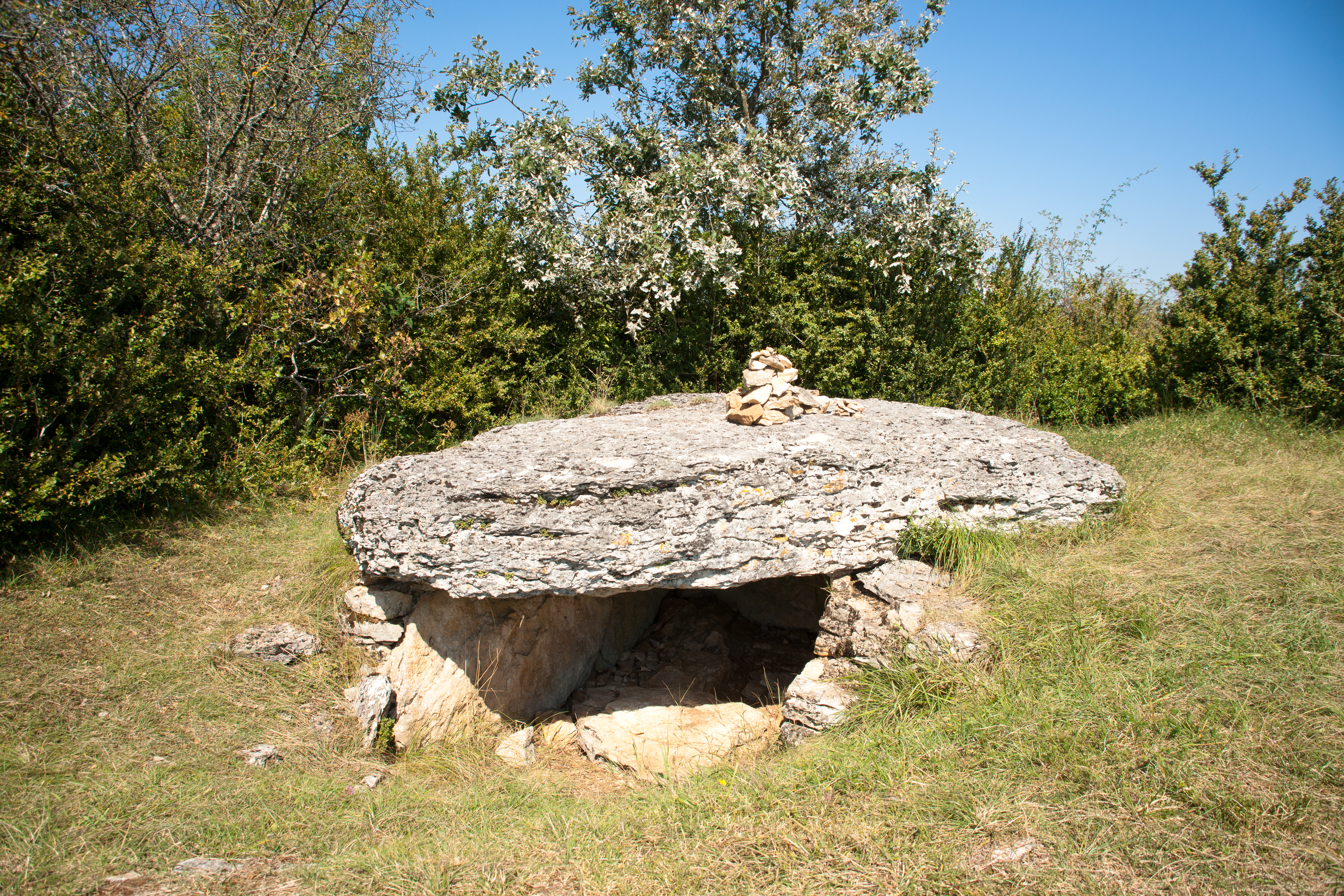 Tumulus-dolmens du Mont-de-Senne .